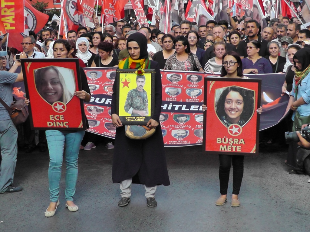 Kurdî: "Merasîma Oxirkirina Qurbanîyên Êrîşa Pirsûsê"